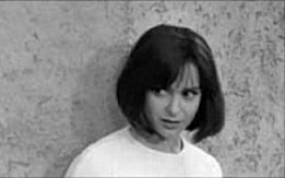 Adriana Asti in the film Prima della rivoluzione by Bernardo Bertolucci (1964)